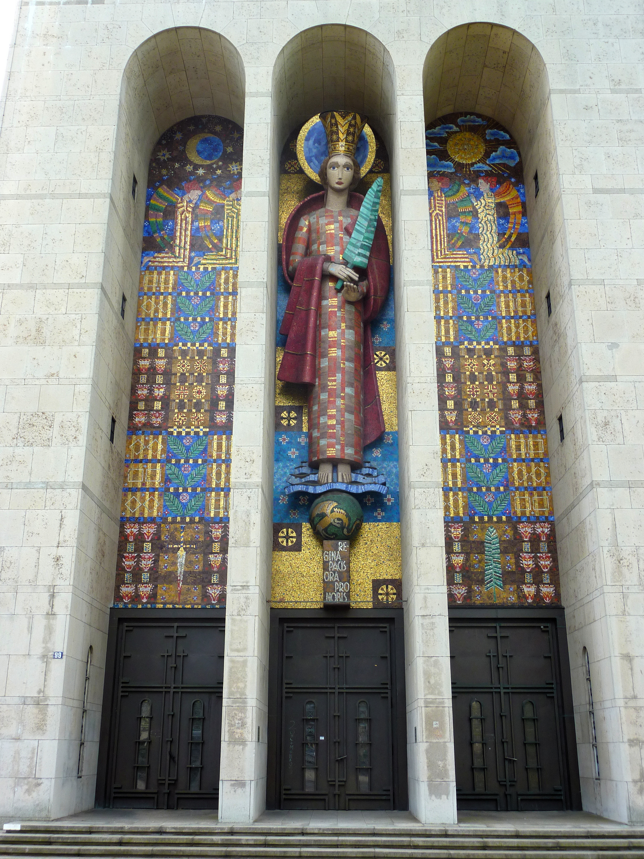 Portal der katholischen Frauenfriedenskirche in Frankfurt am Main (im Stadtteil Bockenheim), mit Marien-Großplastik und Mosaiken von Bildhauer Emil Sutor als Fassadenschmuck.